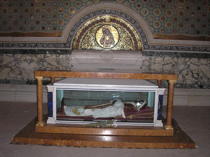 tumulo de pio ix